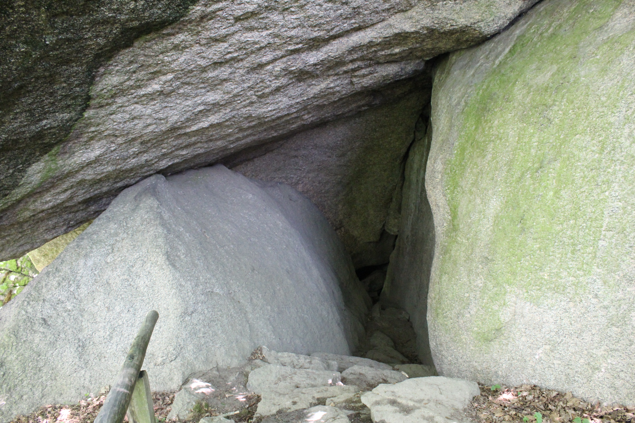 Der Hohle Stein ist eine Felsformation im Felsengarten bei der Burg Falkenstein. Er gehört zu den Geotopen im Landkreis Cham mit der Nummer 372R045.